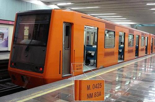 NM-83 convertido a NE-92 por CAF